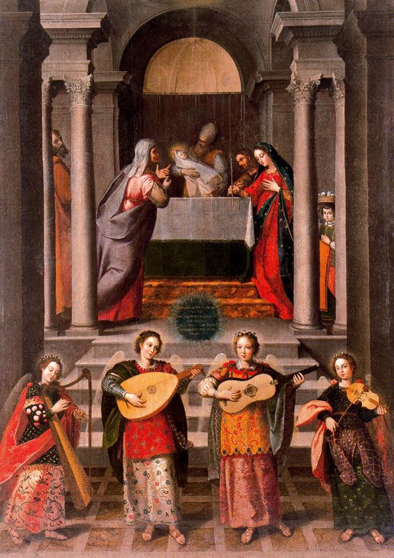 La obra representa el momento en que el Niño Jesús, según lo dispuesto en la ley judía, fue presentado por sus padres en el Templo de Jerusalén.